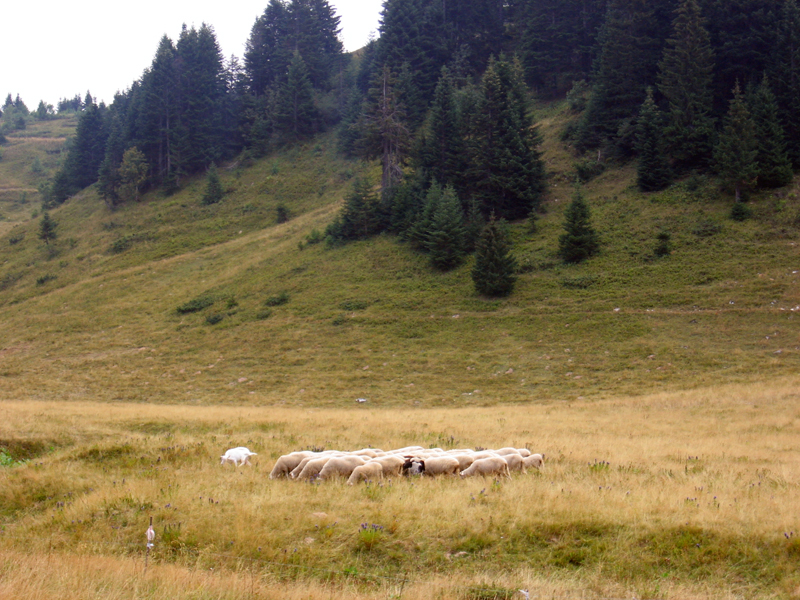 Biogradska gora